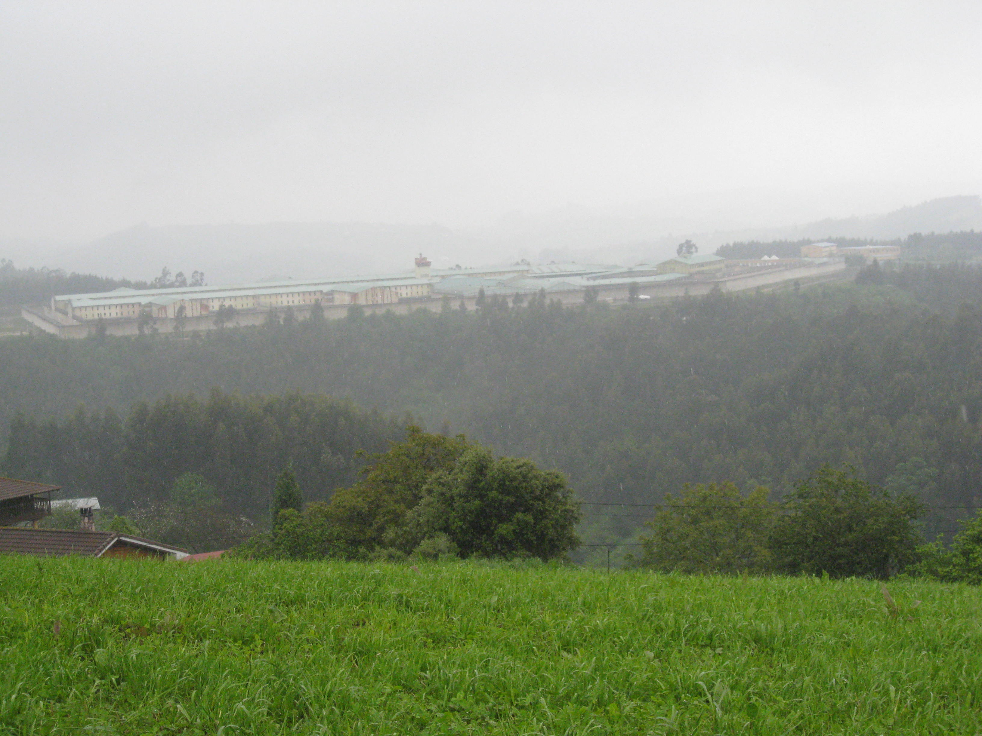 Centro penitenciario de Asturias o de Villabona